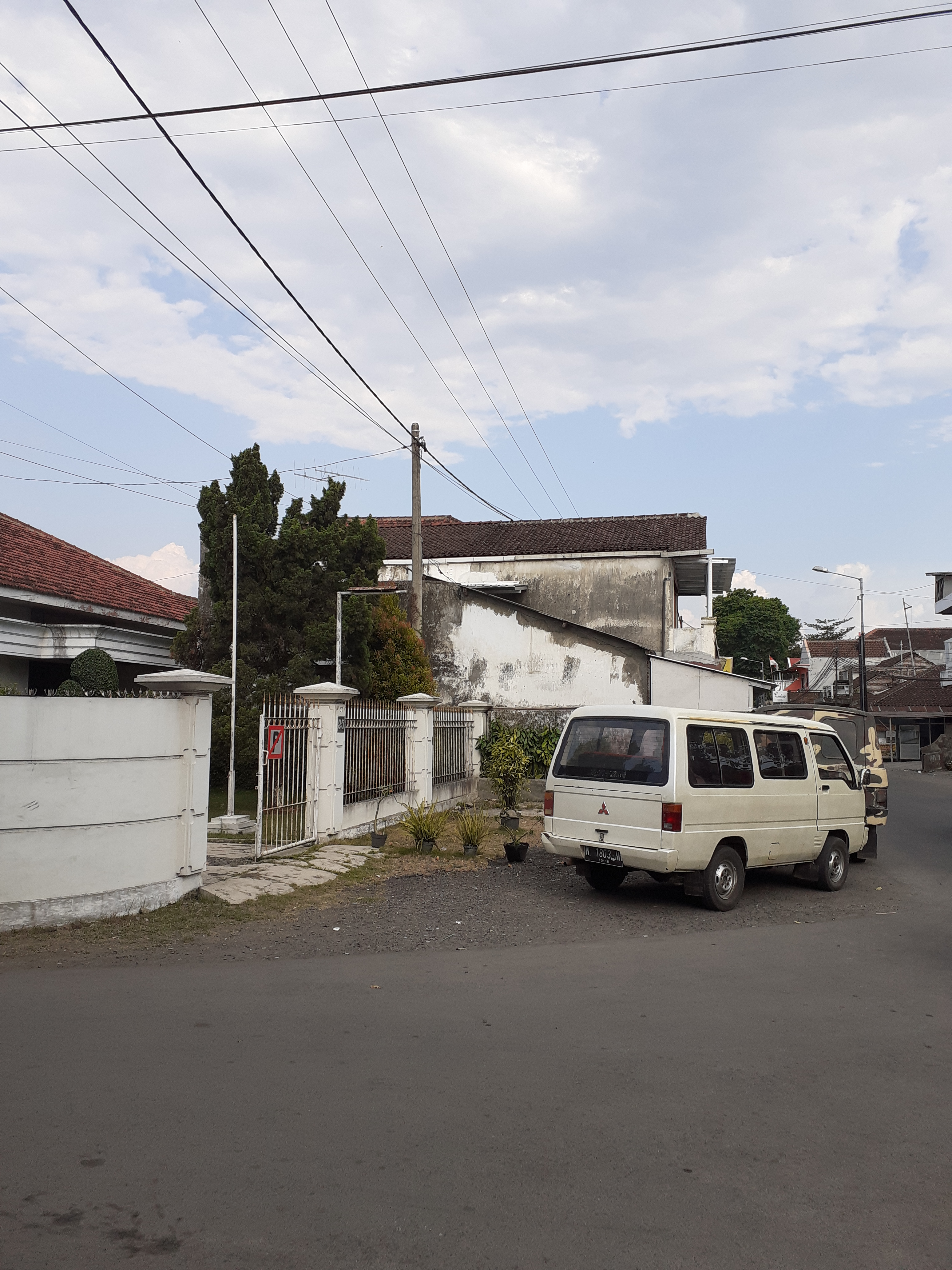 Ruang milik Jl. Mastrip di Kab. Jember. Dapat dilihat bahwa tiang listrik berada cukup jauh dari sumbu jalan